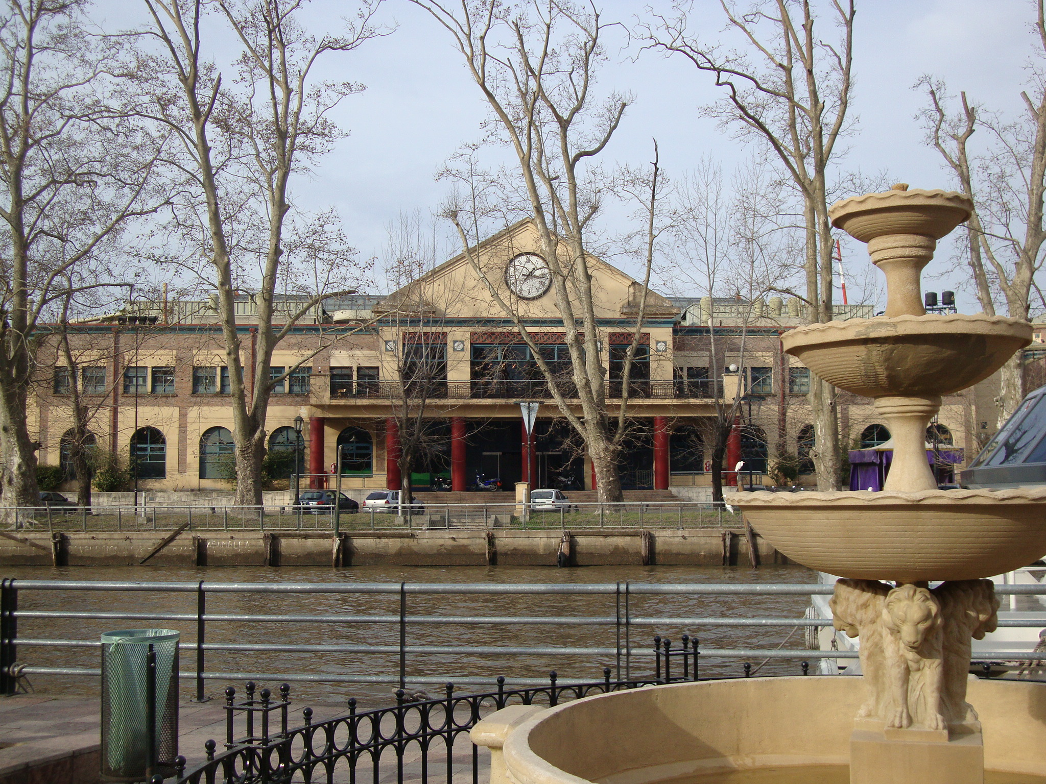 Vista del edificio del Patio de Comidas del Parque de la Costa desde la ribera del Río Tigre. Buenos Aires, Argentina.